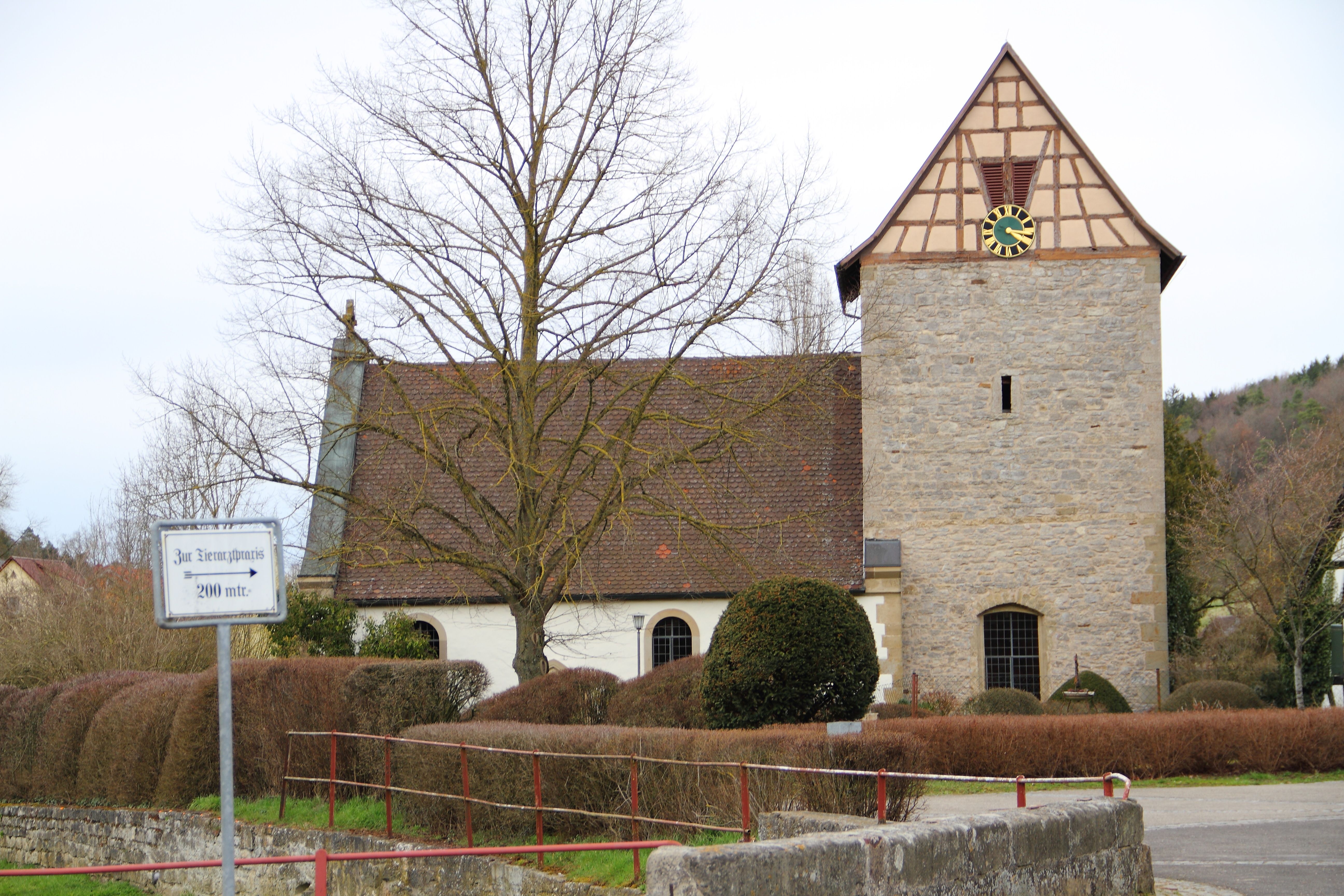 Die denkmalgeschützte evangelische Pfarrkirche aus dem 14. Jahrhundert im Niederstettener Ortsteil Rüsselhausen.